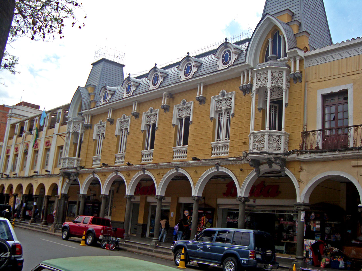 Casa Bickenbach - Tomas Bata This medium shows the protected monument with the number C/00-121 in Bolivia.